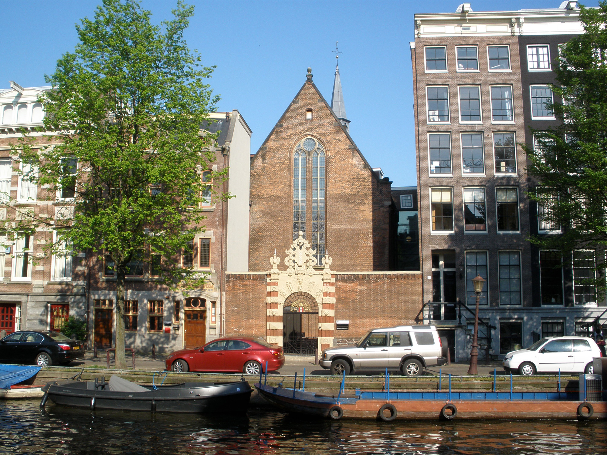 Agnietenkapel (St. Agnes Chapel) on Oudezijds Voorburgwal in Amsterdam